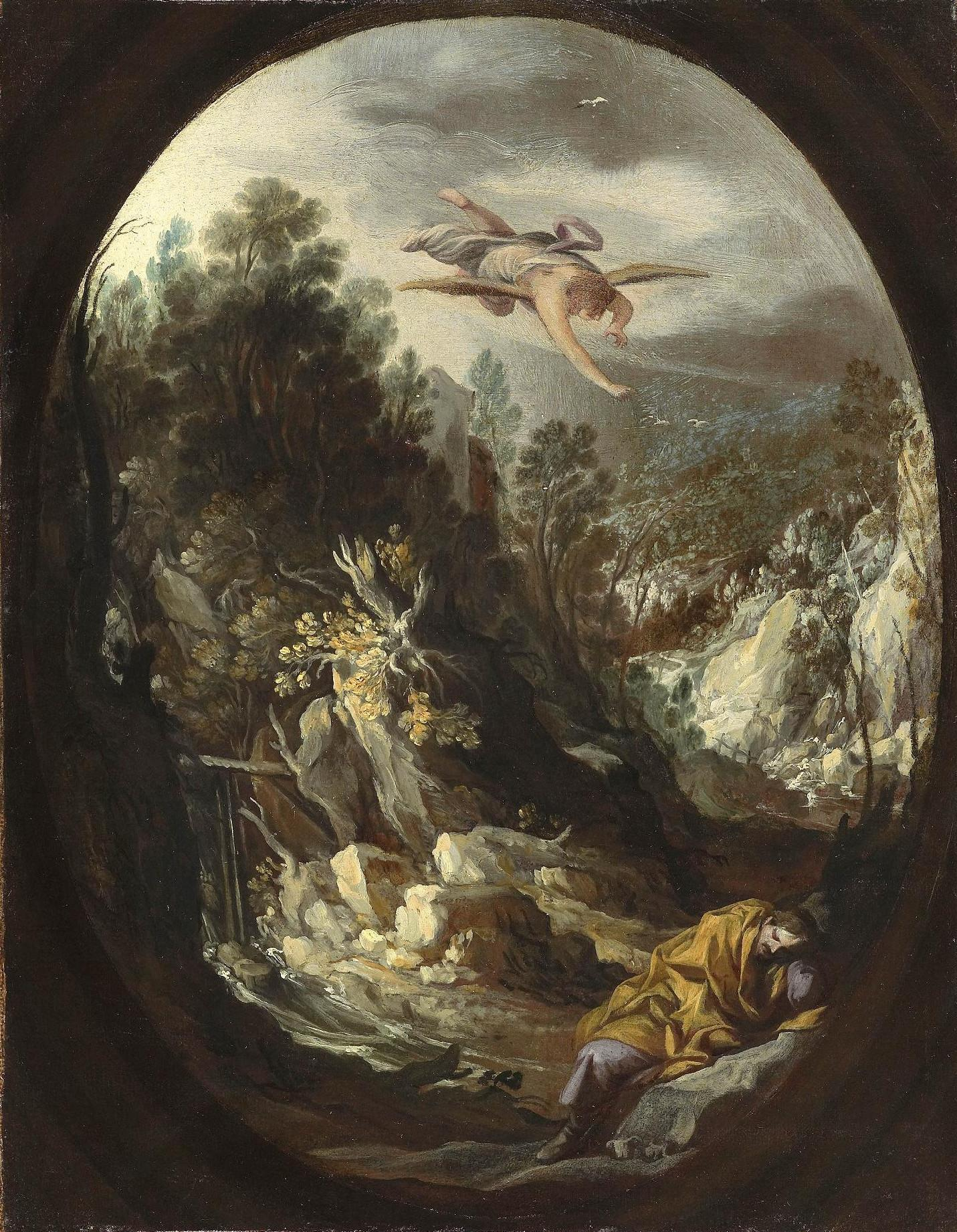 La obra representa el momento en que San José fue avisado mientras dormía o en sueños de que huyera a Egipto con su familia para así poder salvar la vida del Niño Jesús, a quien el rey Herodes el Grande deseaba dar muerte.